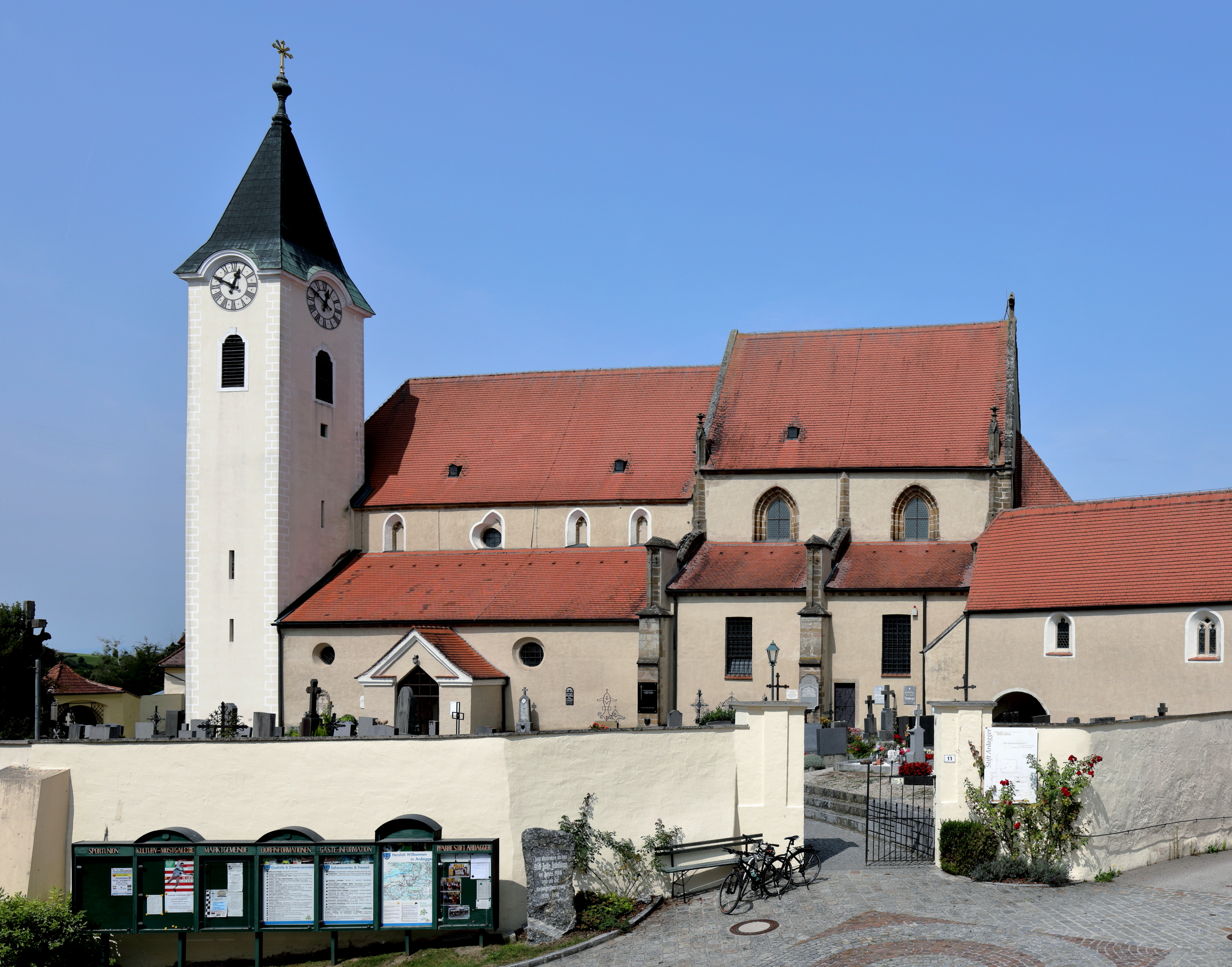 Südostansicht der röm.-kath. Pfarrkirche hl. Margareta und ehemaligen Kollegiatstiftskirche in der niederösterreichischen Marktgemeinde Ardagger und ganz rechts ein Teil der ehemaligen Anna- bzw. Friedhofskapelle.Die Kirche wurde im 13. Jahrhundert errichtet, im 14. Jahrhundert umgebaut, im Jahr 1529 von den Türken geplündert und in Brand gesetzt. Sie lag dann fast 40 Jahre lang in Trümmern und wurde ab 1567 durch Probst Grübler wieder aufgebaut. 1620/27 fand eine erste Barockisierung statt und eine zweite 1678. Im Jahr 1784 erfolgte die Aufhebung des Stiftes und 1804/06 wurde der Kirchturm errichtet.